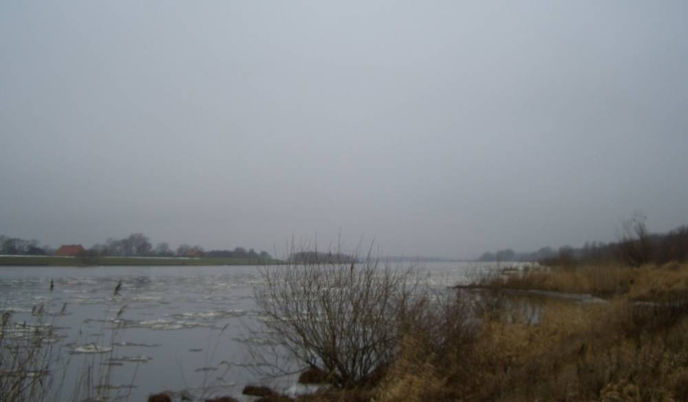 Elbetal westlich von Boizenburg.